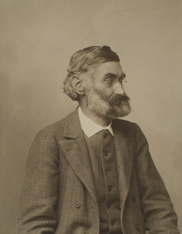 Ernst Abbe, Physiker, Leiter der Optischen Werke Zeiss, seit 1877 Direktor der Sternwarte in Jena